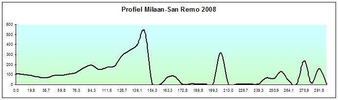 Profiel van Milaan-San Remo 2008